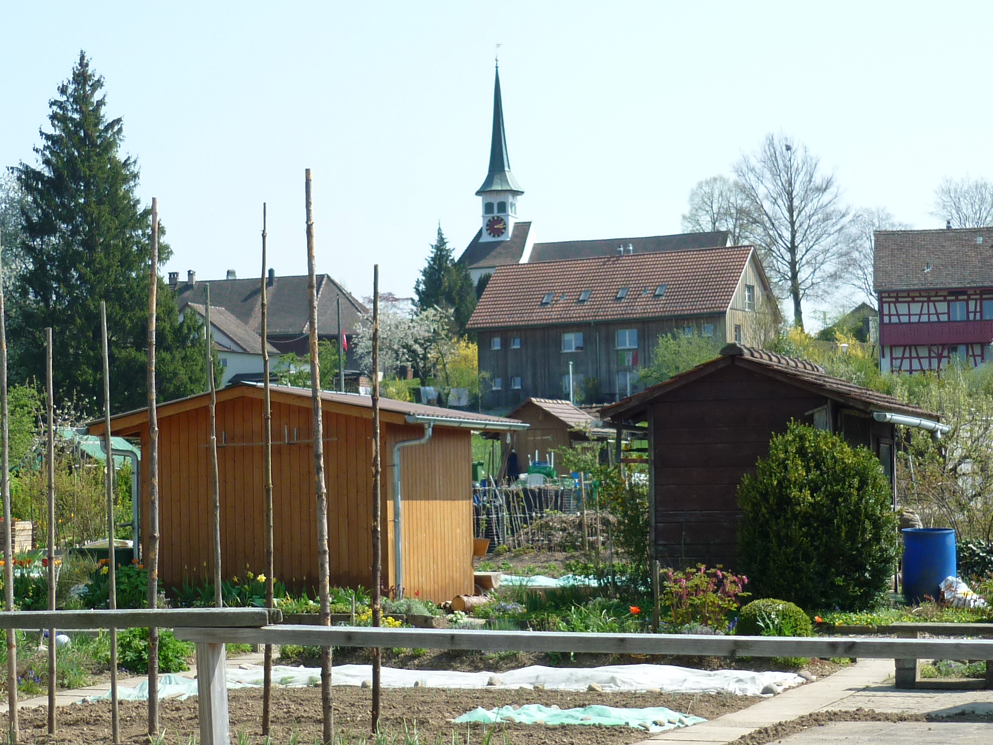 Reformierte Kirche Seuzach ZH, Schweiz